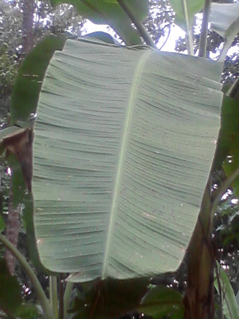 വാഴയില